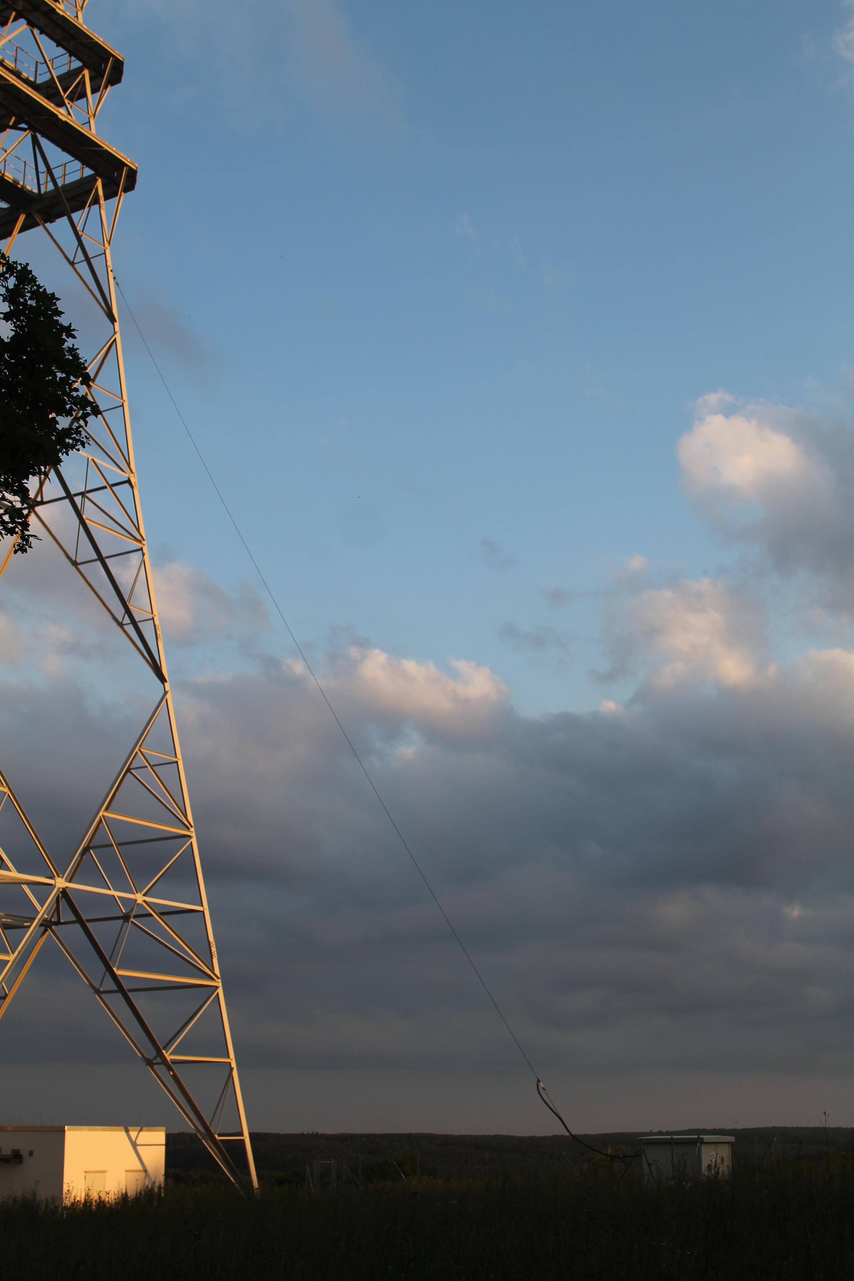 Mittelwellen-Sendeantenne des Aussichtsturms Würzburg-Frankenwarte - Google Maps - Google Earth